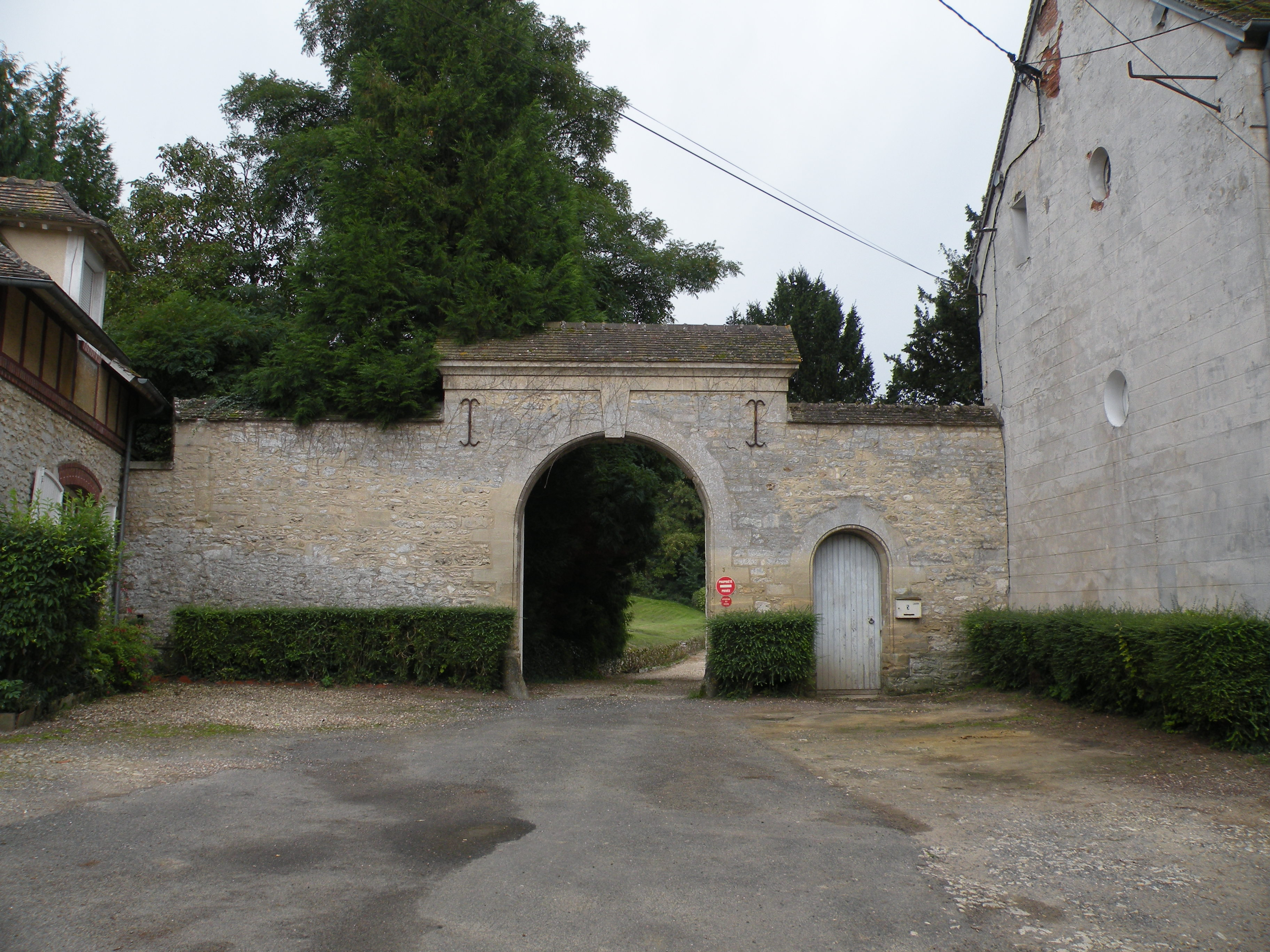 Vaudancourt portail du château